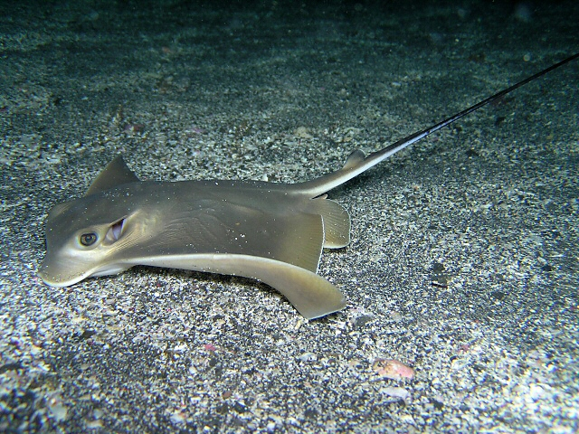 トビエイ Myliobatis tobijei